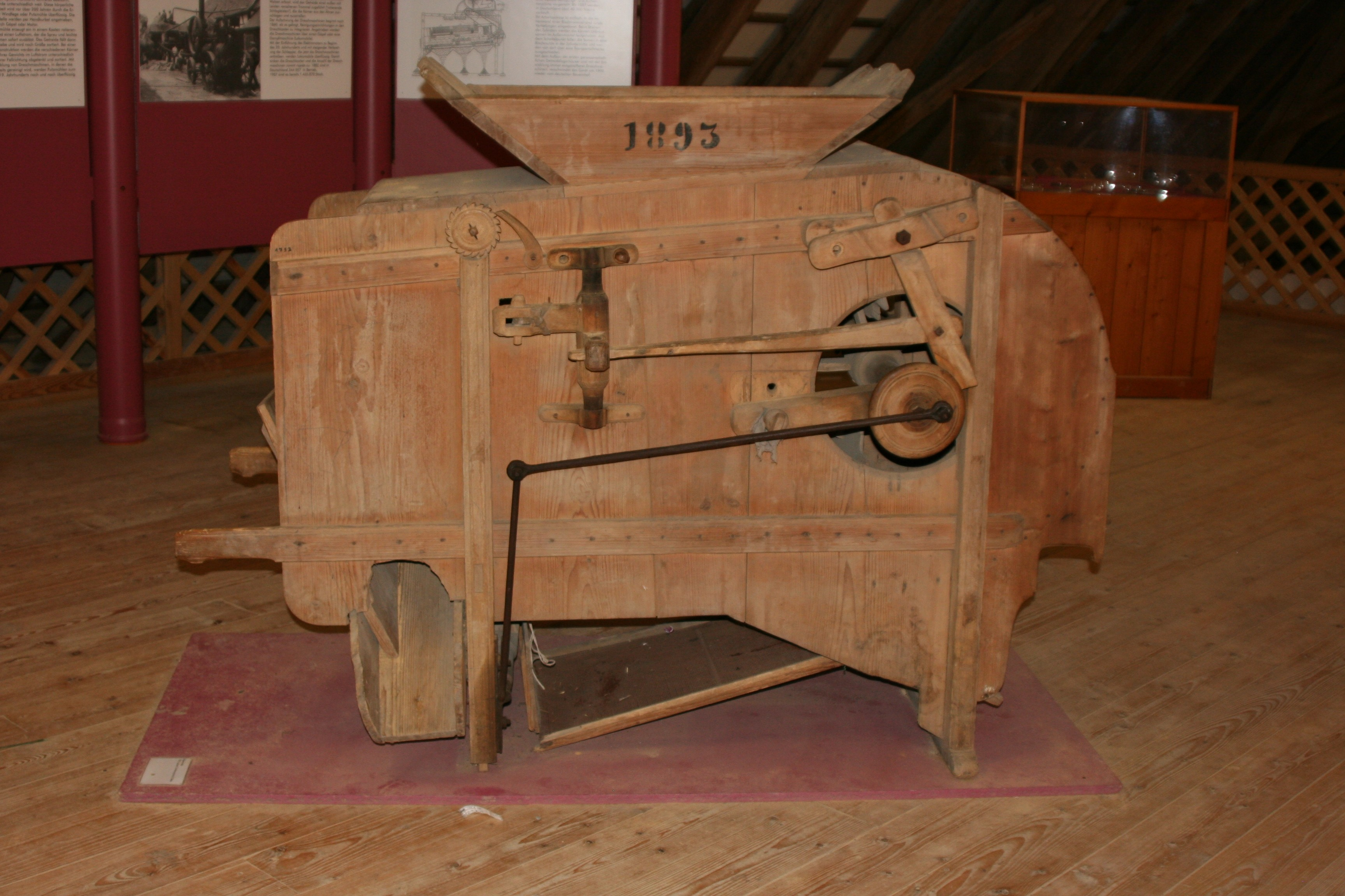 Getreideputzmühle (Vorläufer der Dreschmaschine) aus der Ausstellung landwirtschaftlicher Gerätschaften im Freilandmuseum Wackershofen